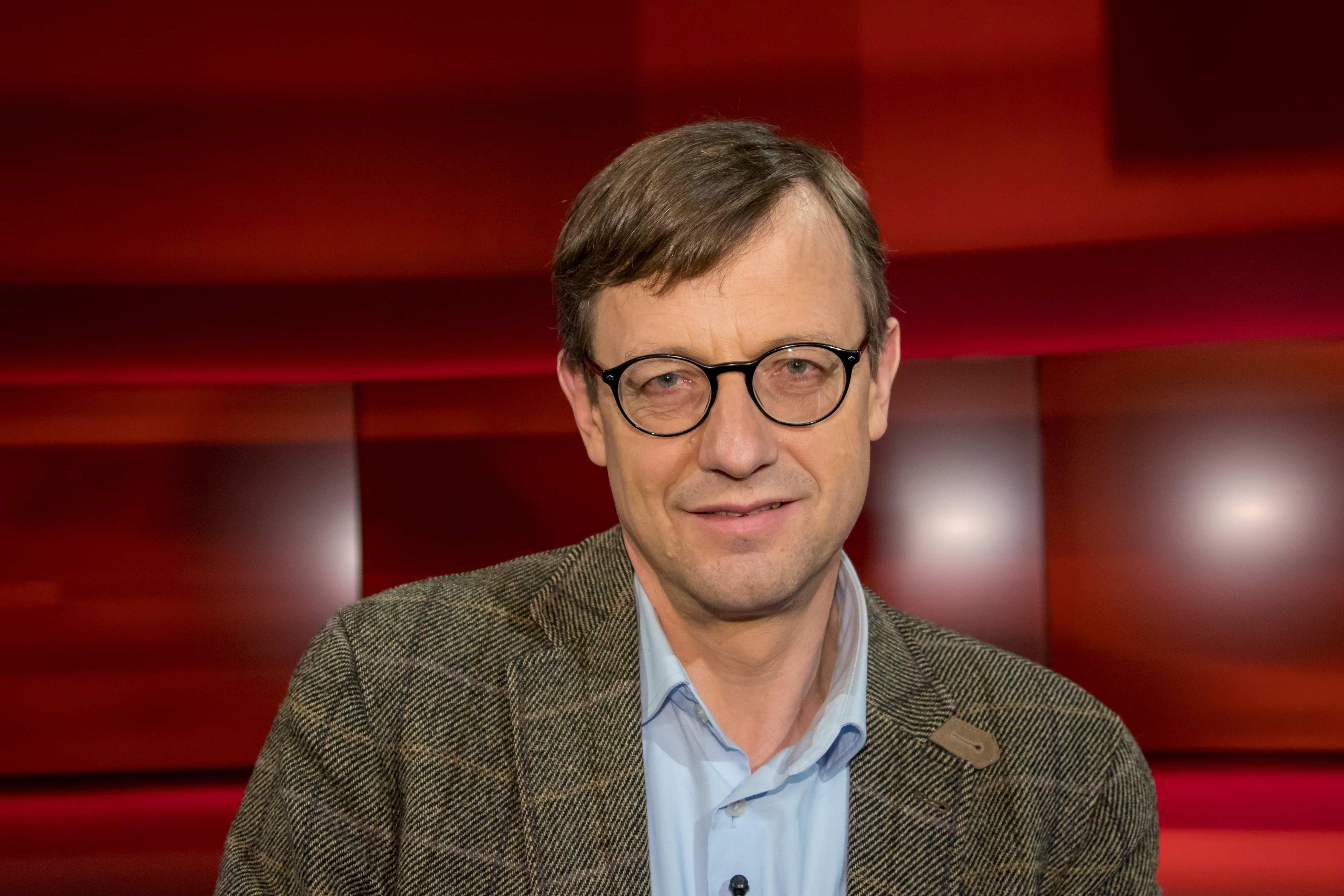 Thomas Roeb in der WDR-Sendung "hart aber fair" am 13.2.2018